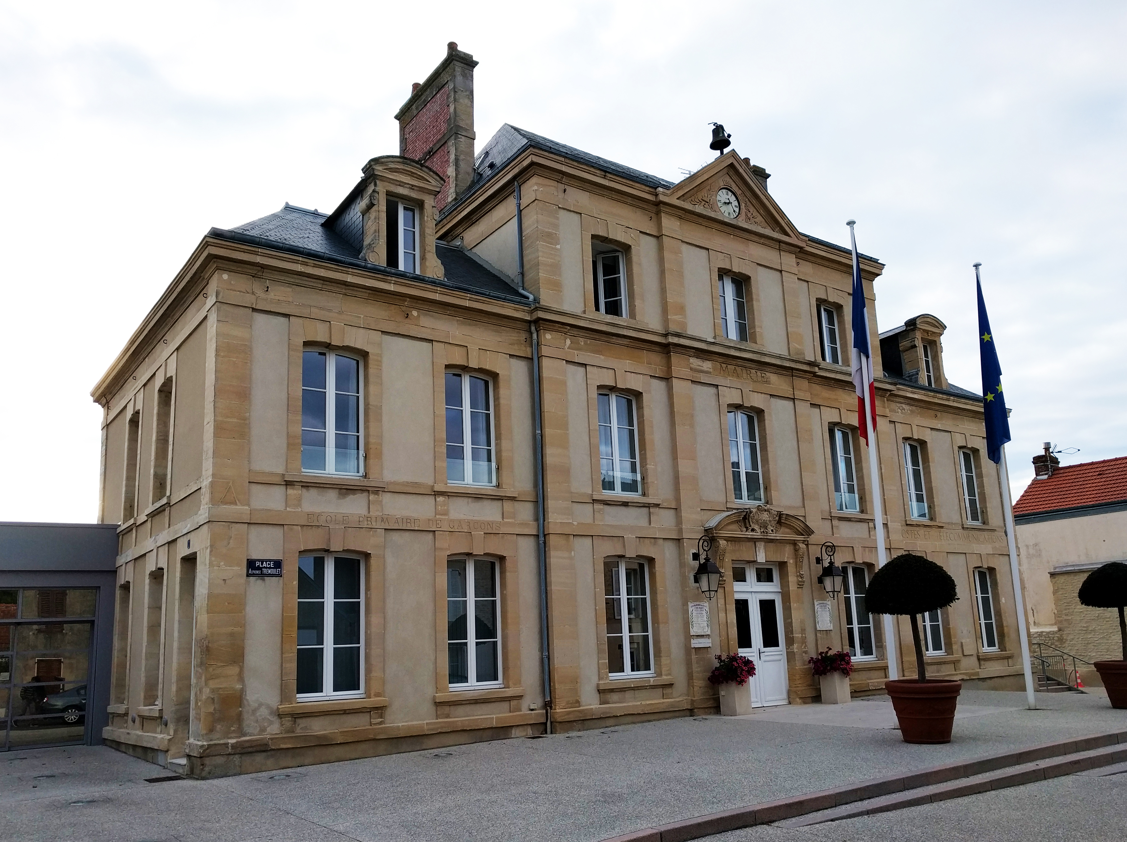 Ayuntamiento de Arromanches-les-Bains, Normandía